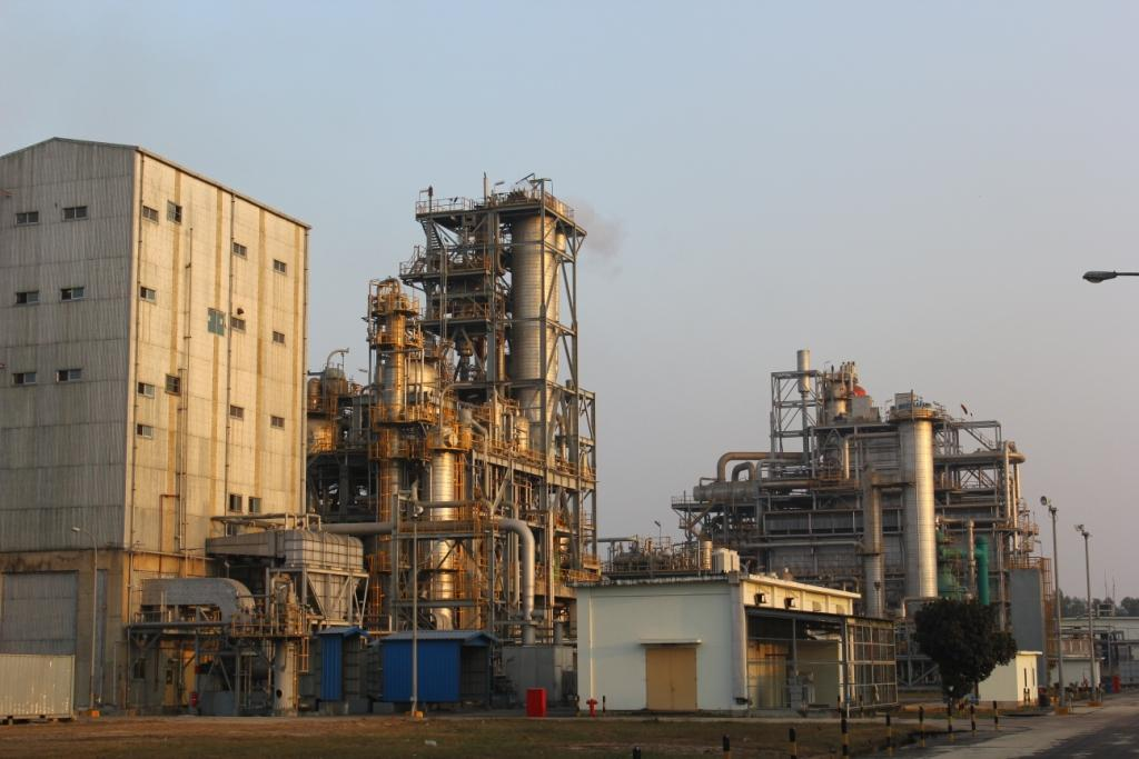 কাফকো কারখানার এক অংশ